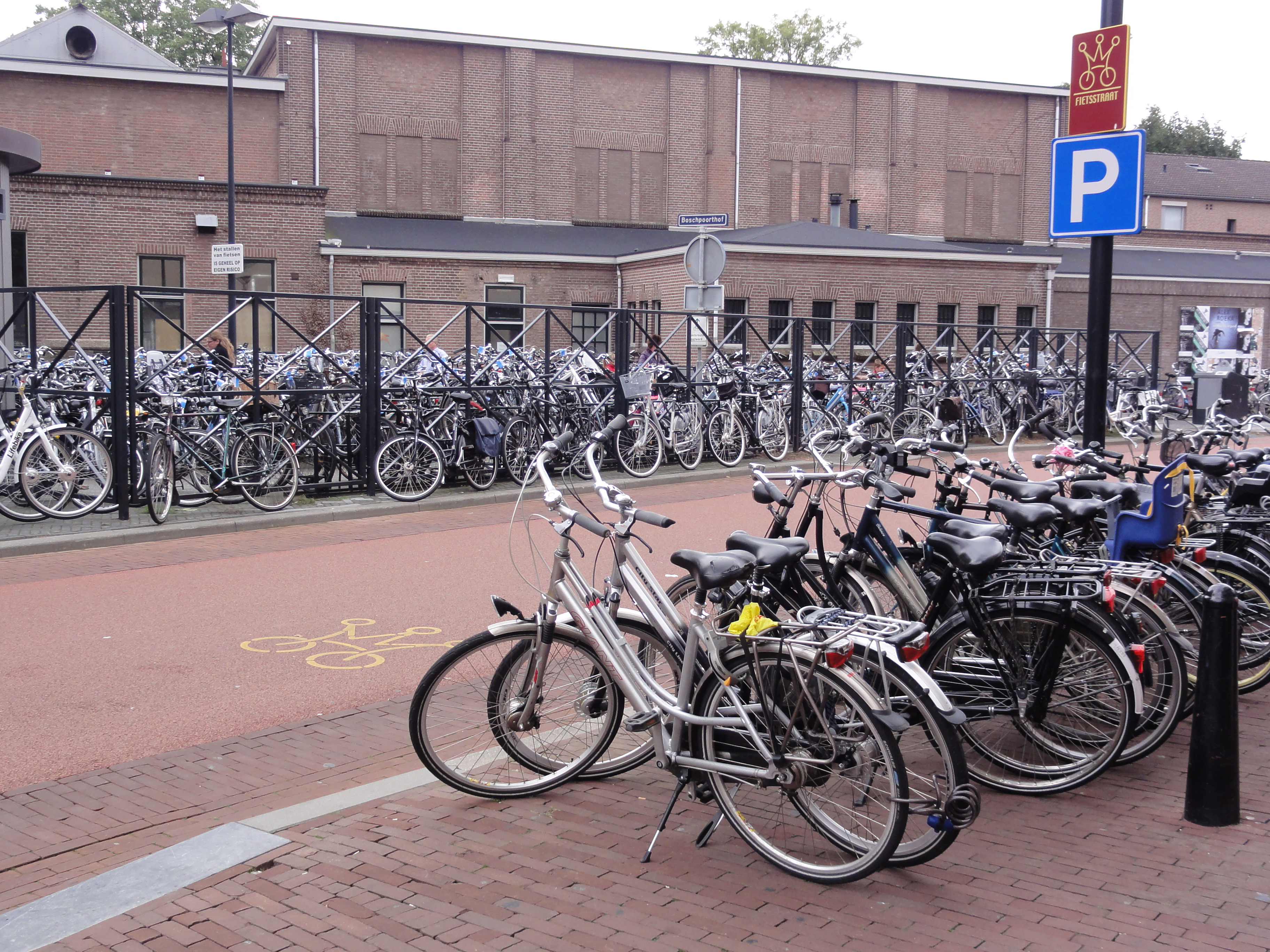 Oss Rijksmonument 516599 voormalige Jurgensfabriek, nu cultureel centrum annex café De Groene Engel, Kruisstraat 15. Tijdens stadsmanifestaties is op het terrein een fietsenstalling. de straat er opzij langs is tot Fietsstraat verklaard 58″ N, 5° 31′ 21.05″ E Object location51° 46′ 02.57″ N, 5° 31′ 19.47″ E